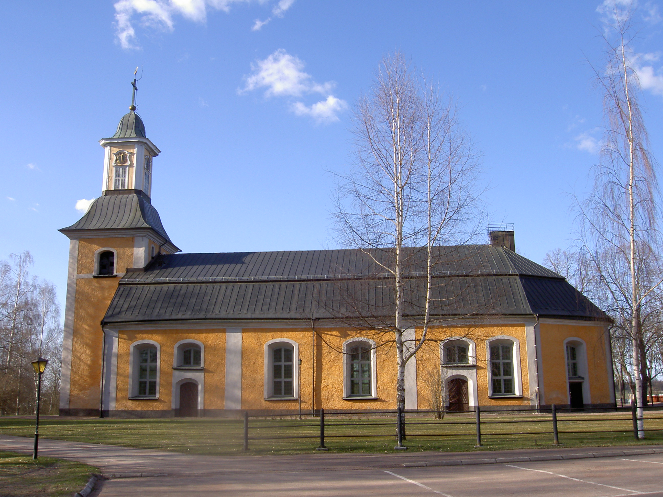 Gustafs kyrka